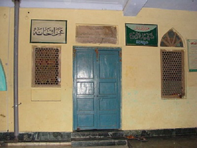 شہید رابع محمد کامل دہلوی